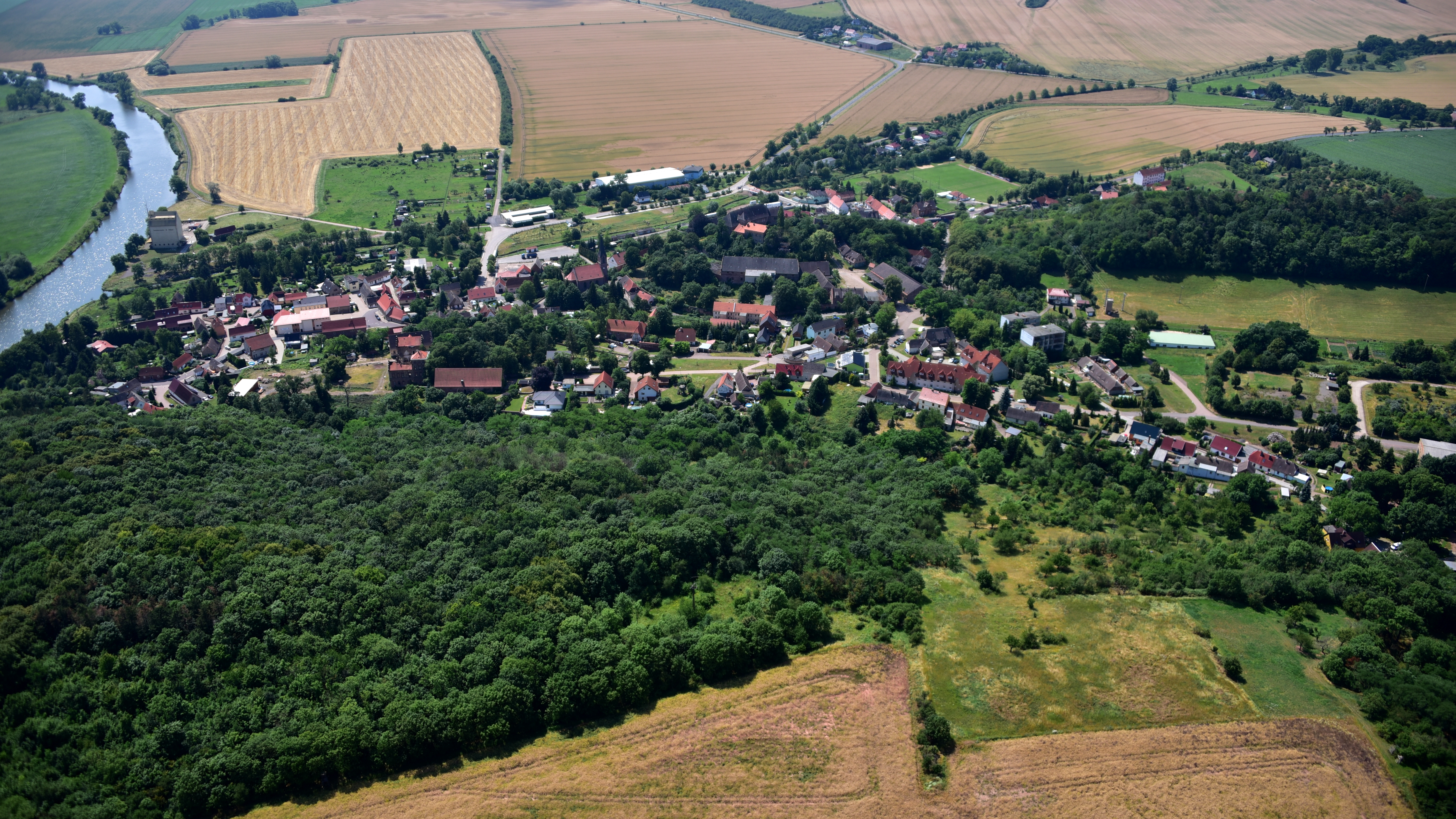 Friedeburg (Saale), Luftaufnahme (2017)